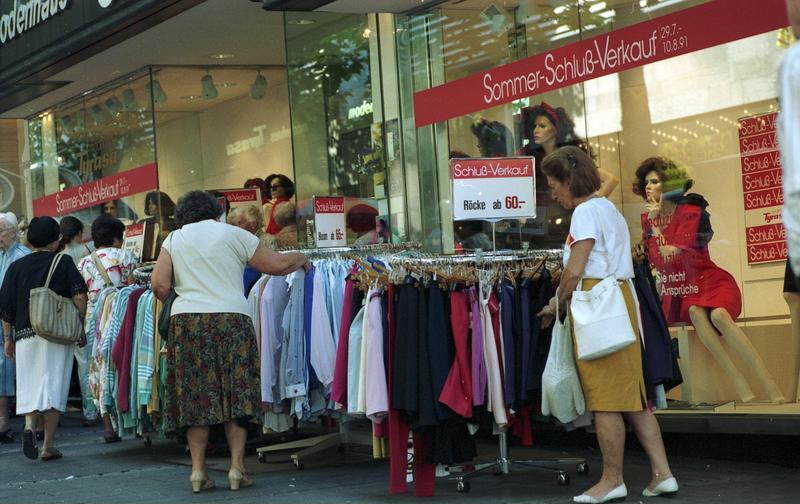 29.7.1991 Szenen in der Bonner Innenstadt (Fußgängerzone) während des Sommer-Schluß-Verkaufs